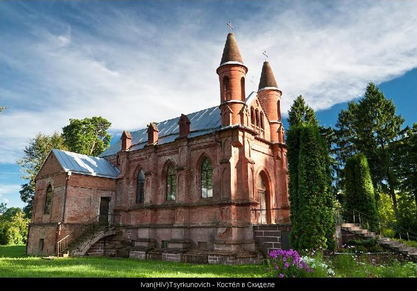 Старый костёл